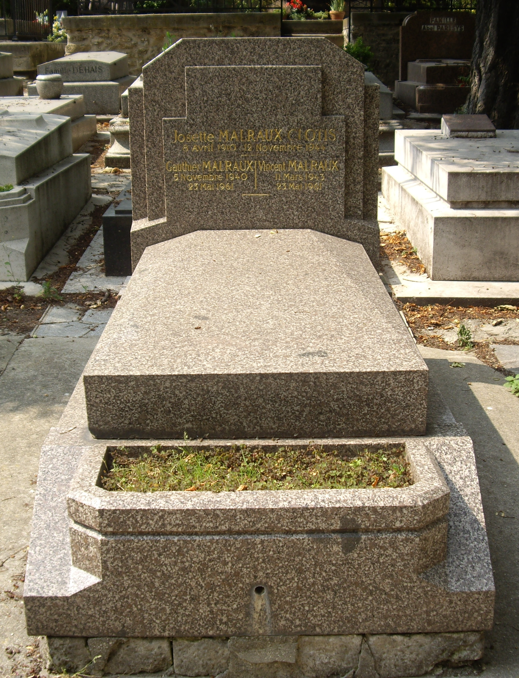 Tombe de Josette Clotis, compagne d'André Malraux, et de leurs fils Gauthier Malraux et Vincent Malraux, au cimetière de Charonne, Paris 20e.